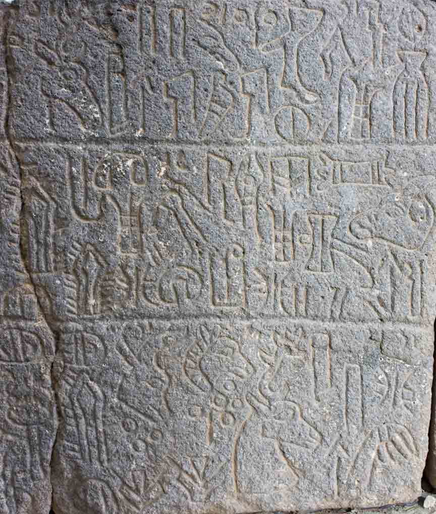 Hieroglyphenluwische Inschrift, Karatepe, Türkei